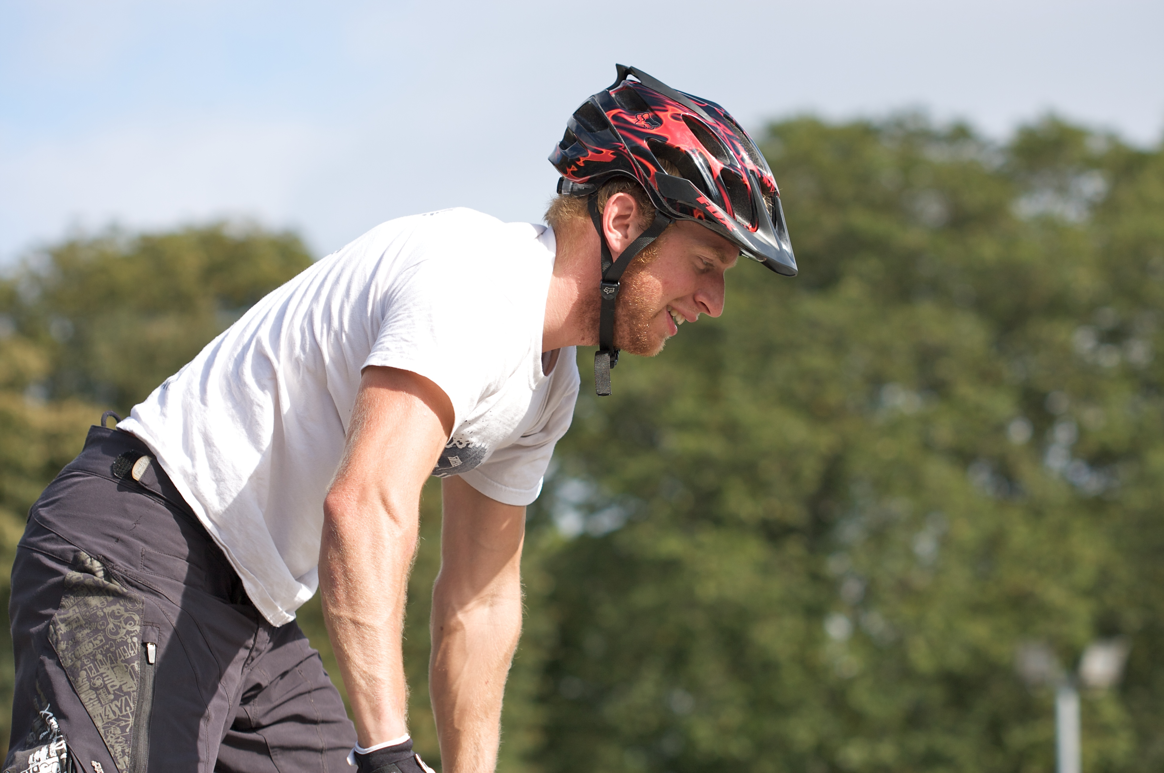 Danny MacAskill